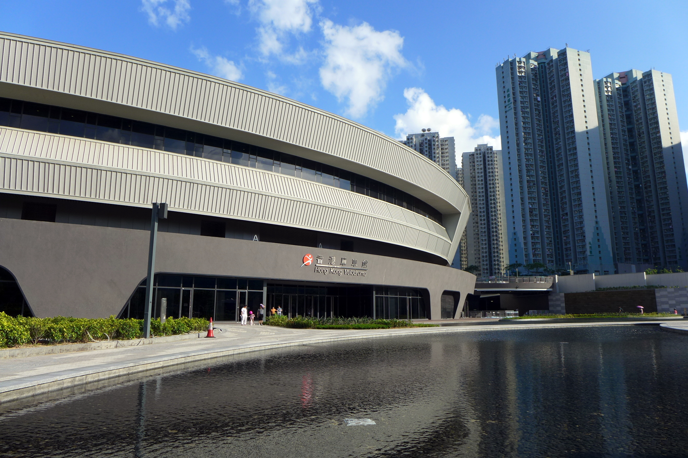 Hong Kong Velodrome View_